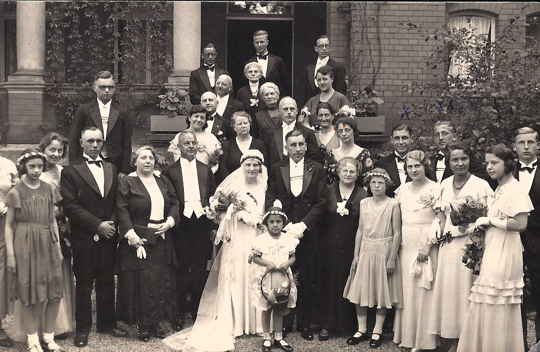 Hochzeit eines Angehörigen des Corps Normannia Gießen